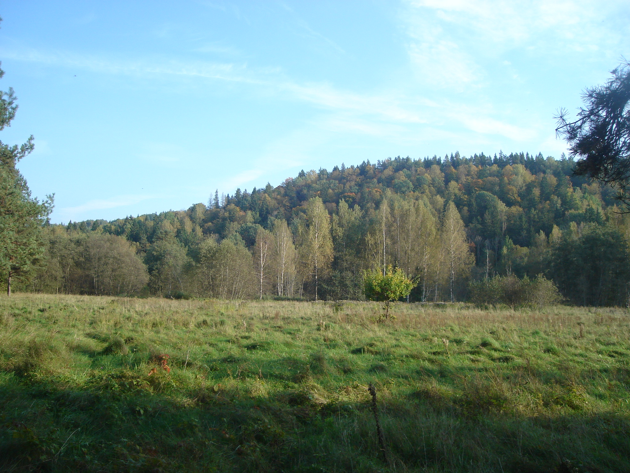 kalns un pļava